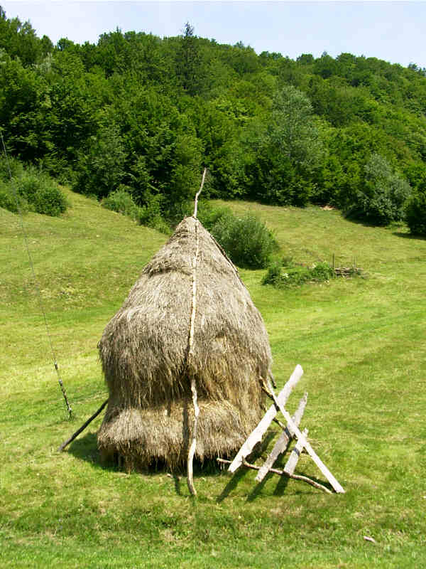 Szénaboglya Erdélyben